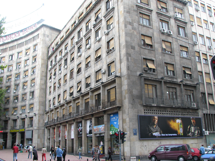 Dom sindikata in Belgrade, Serbia/Dom sindikata (la Maison des syndicats) à Belgrade, Serbie